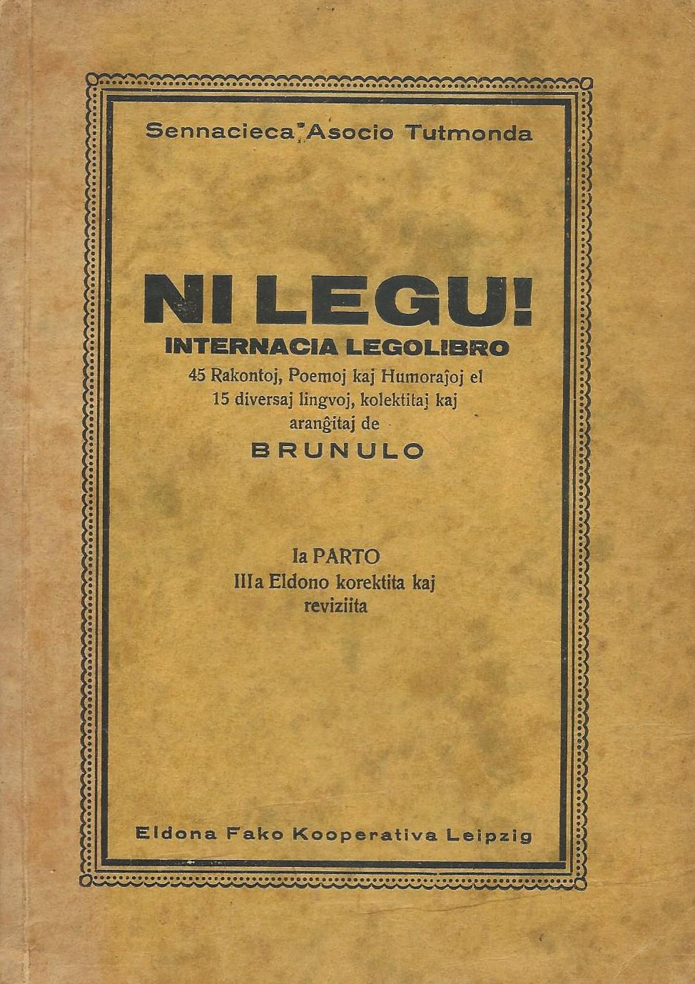 librokovrilo de "Ni Legu! Internacia Libro", 1930